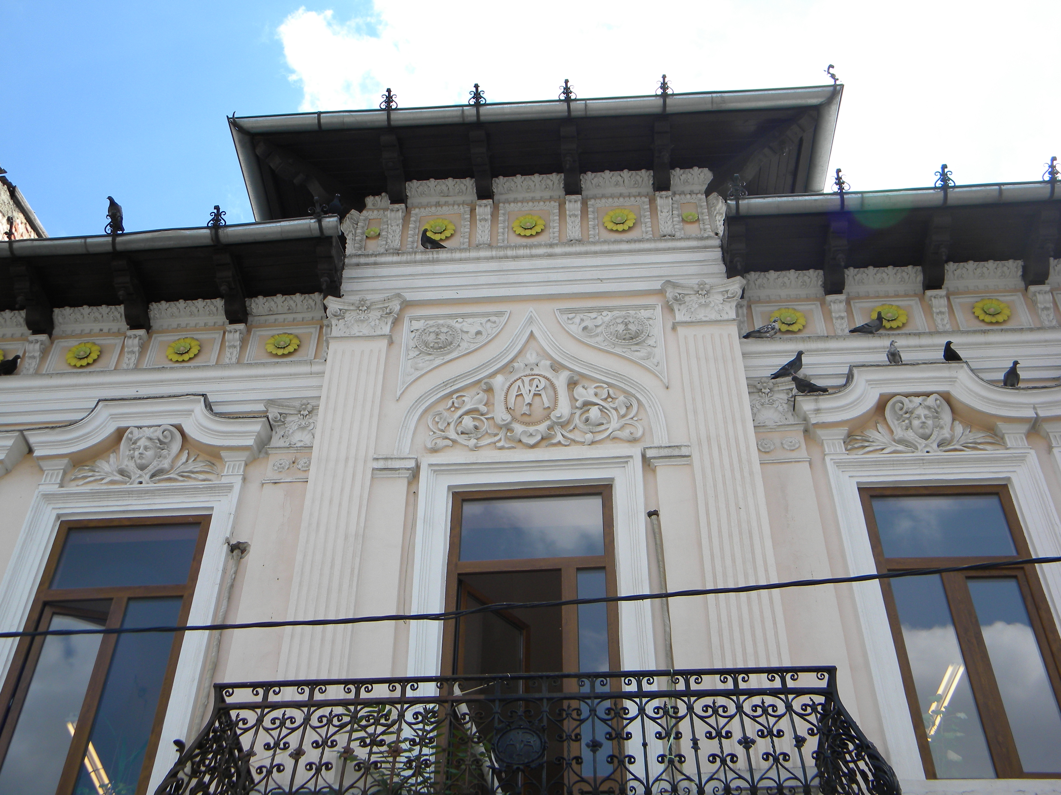 Bucuresti, Romania, Str. Atelierului nr. 24, sect. 1; B-II-m-B-18014 (detaliu 4)